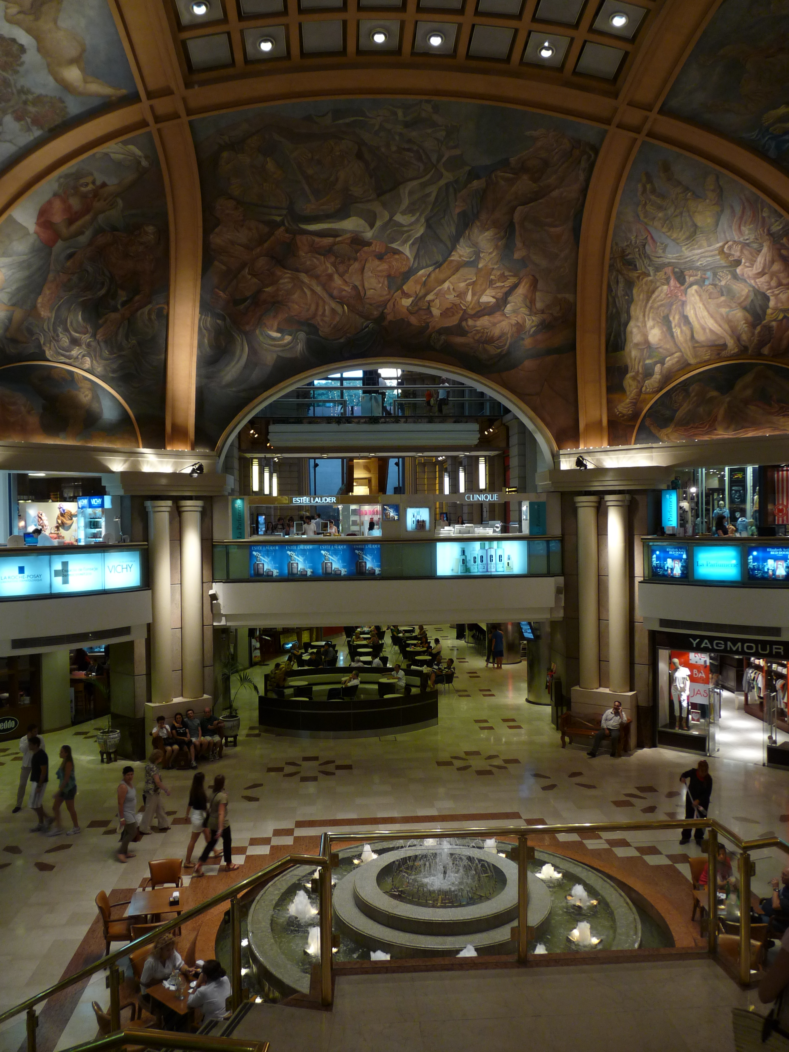 Visão interna das Galerías Pacífico, em Buenos Aires, Argentina